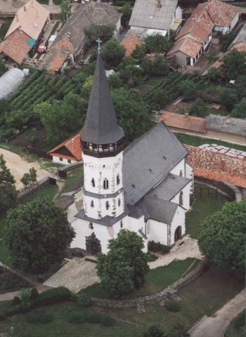 Gyöngyöspata, Hungary, aerialphotography